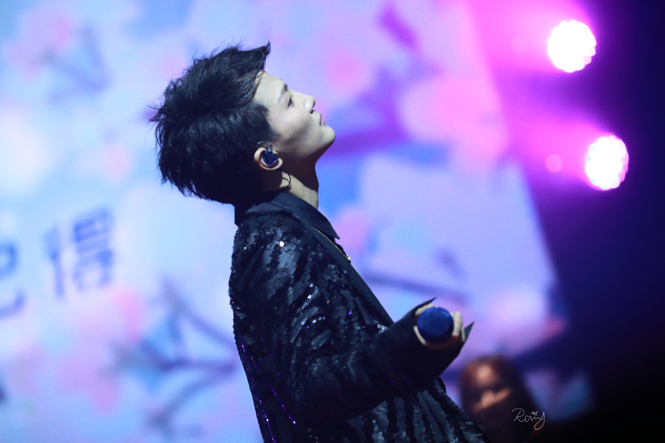 中文（中国大陆）: 2019年6月22日，周深于“深空间演唱会·深圳站”